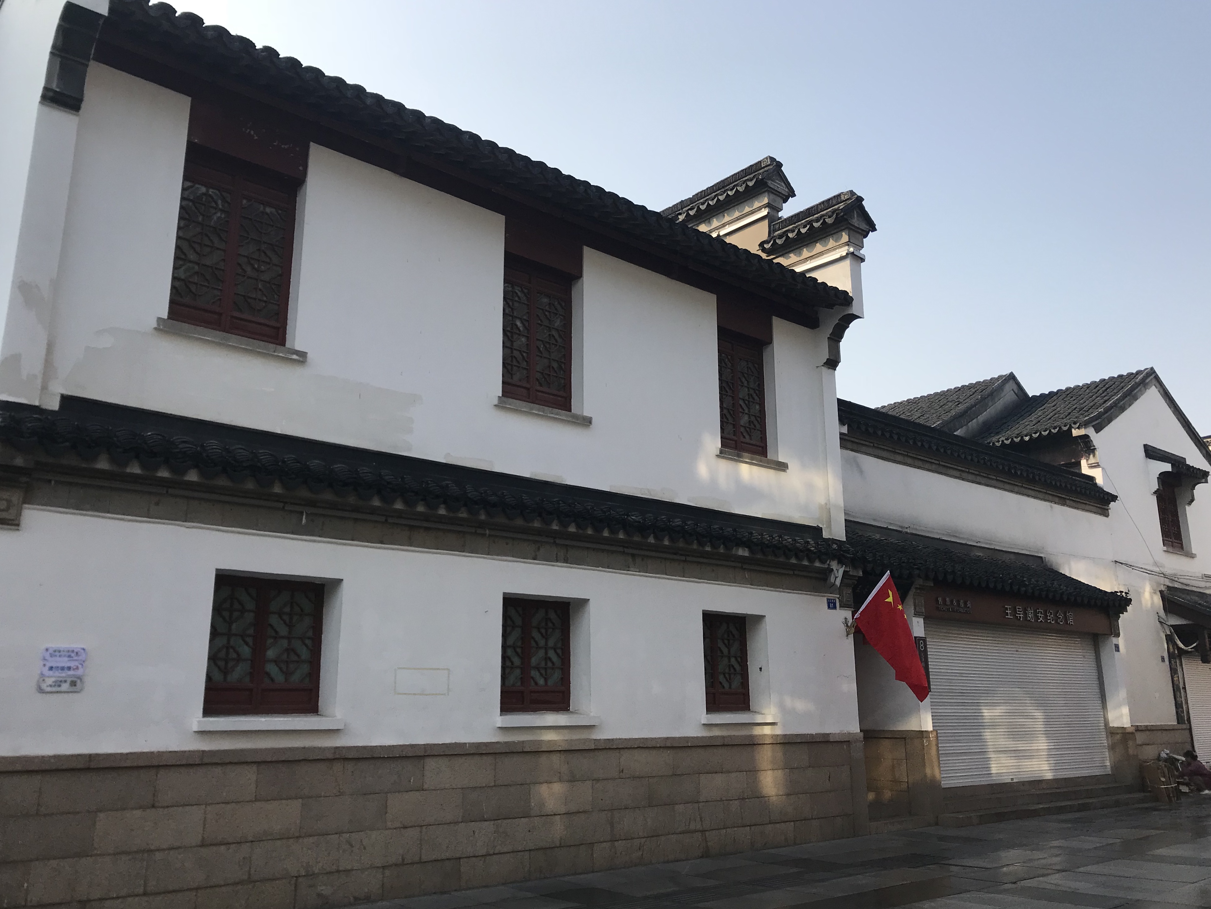 夫子廟・王導謝安記念館